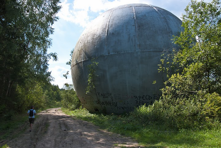 Загадочный шар под Дубной